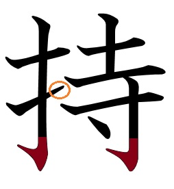 Image montrant le kanji 持 pour illustrer les manières de terminer les traits (tome, hane, harai)